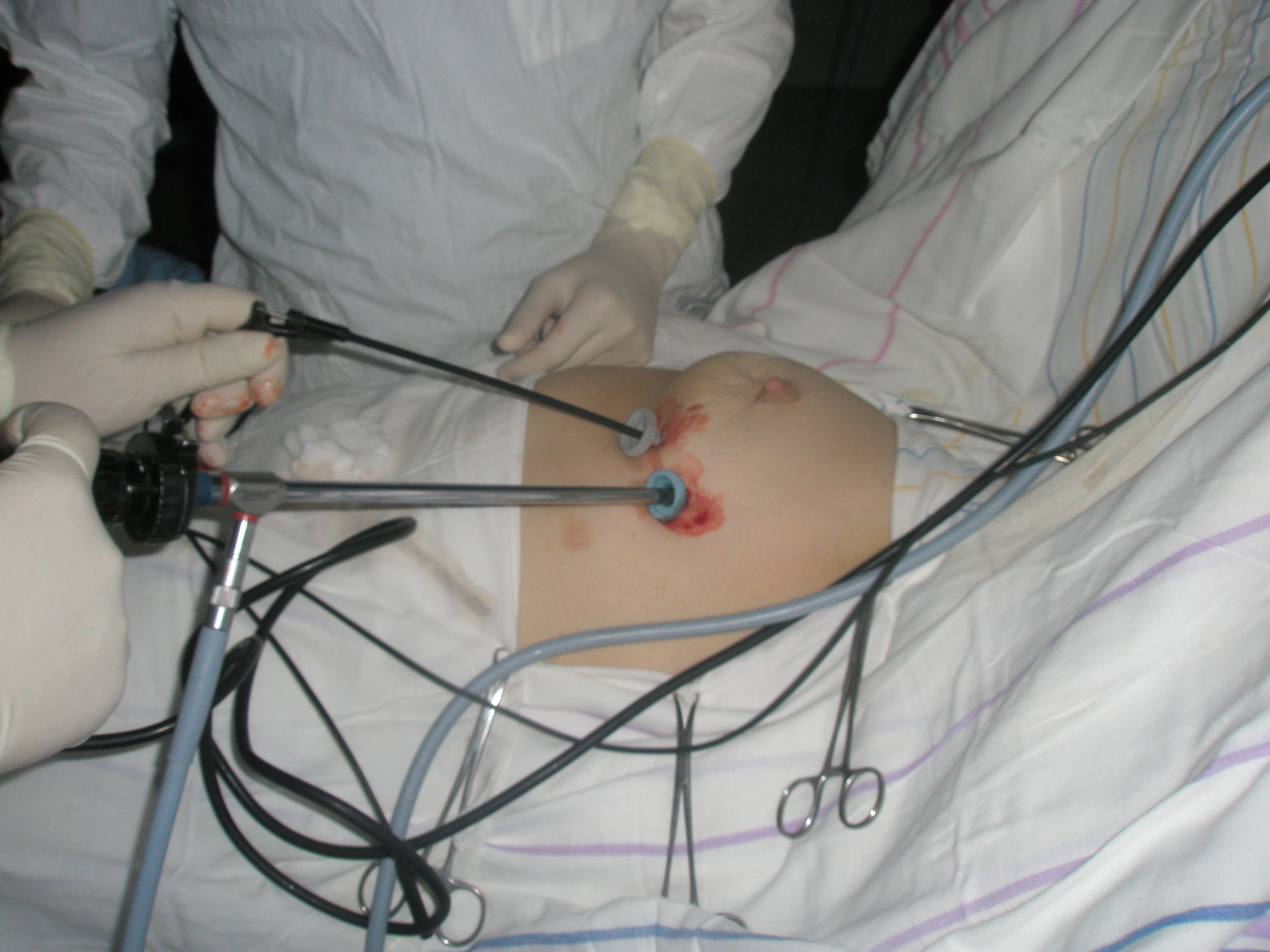 Видеоторакоскопическая операция: биопсия плевры, плевродез